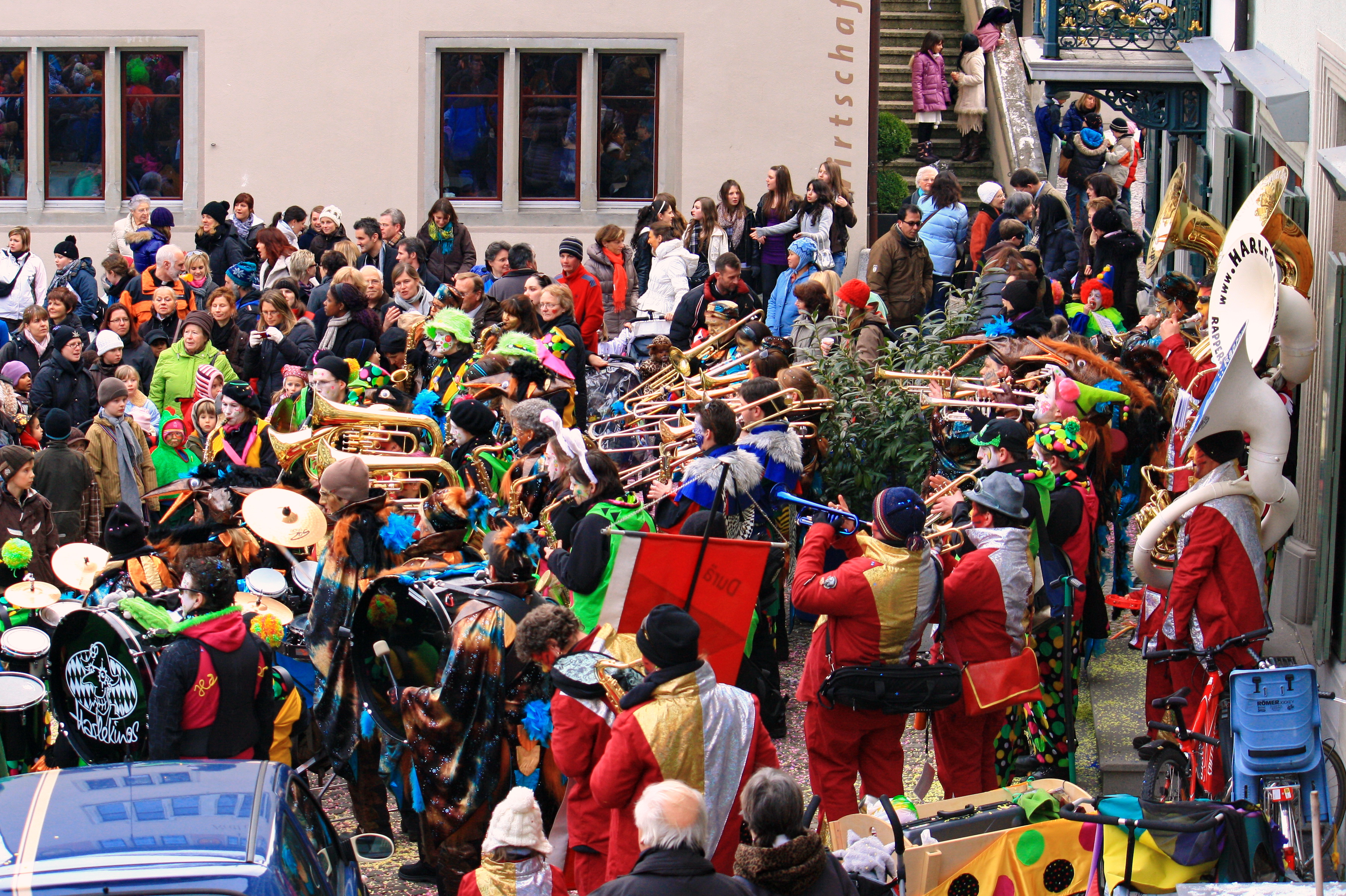 Eis-zwei-Geissebei at Rathaus on Hauptplatz in Rapperswil (Switzerland)